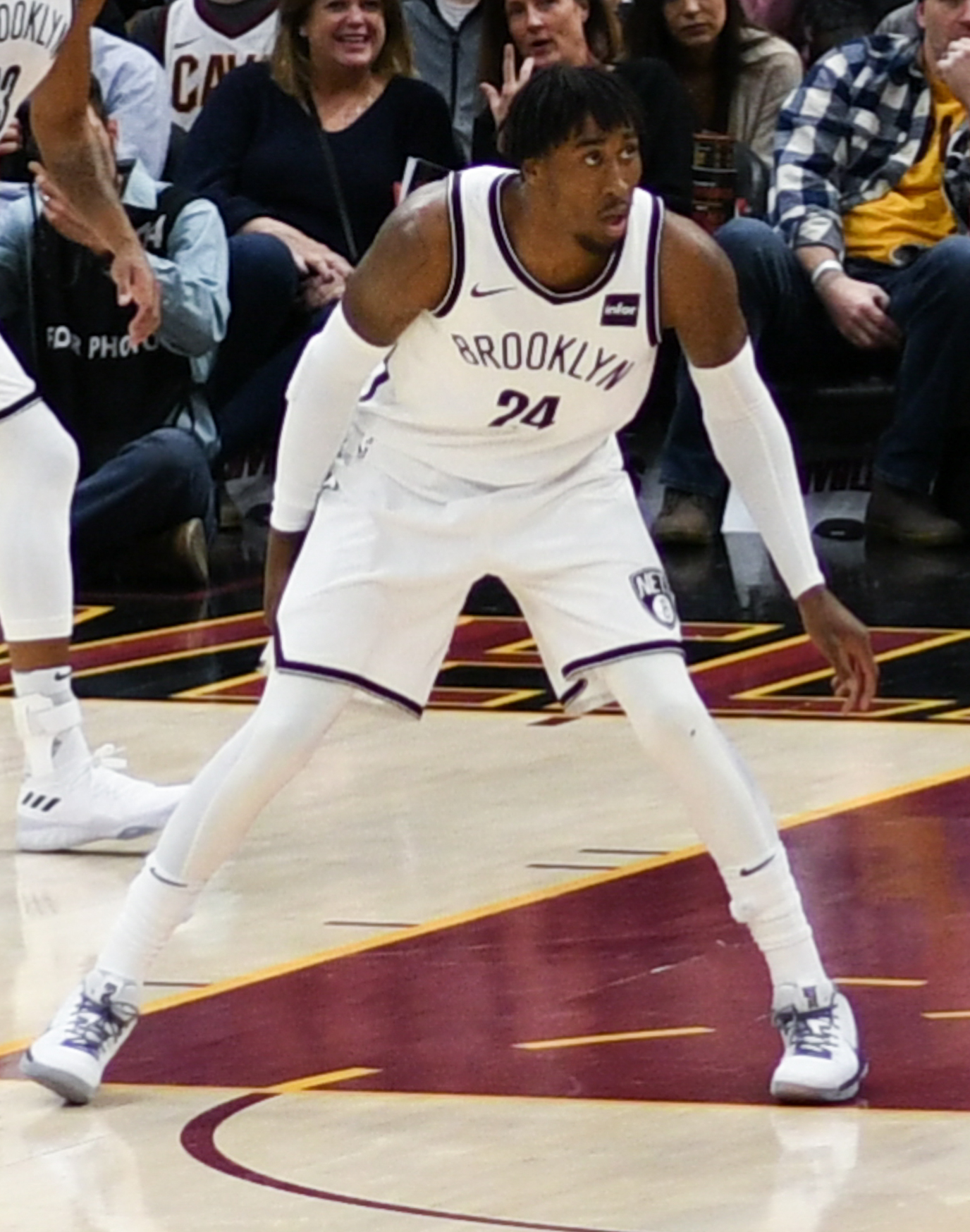 Rodney Hood